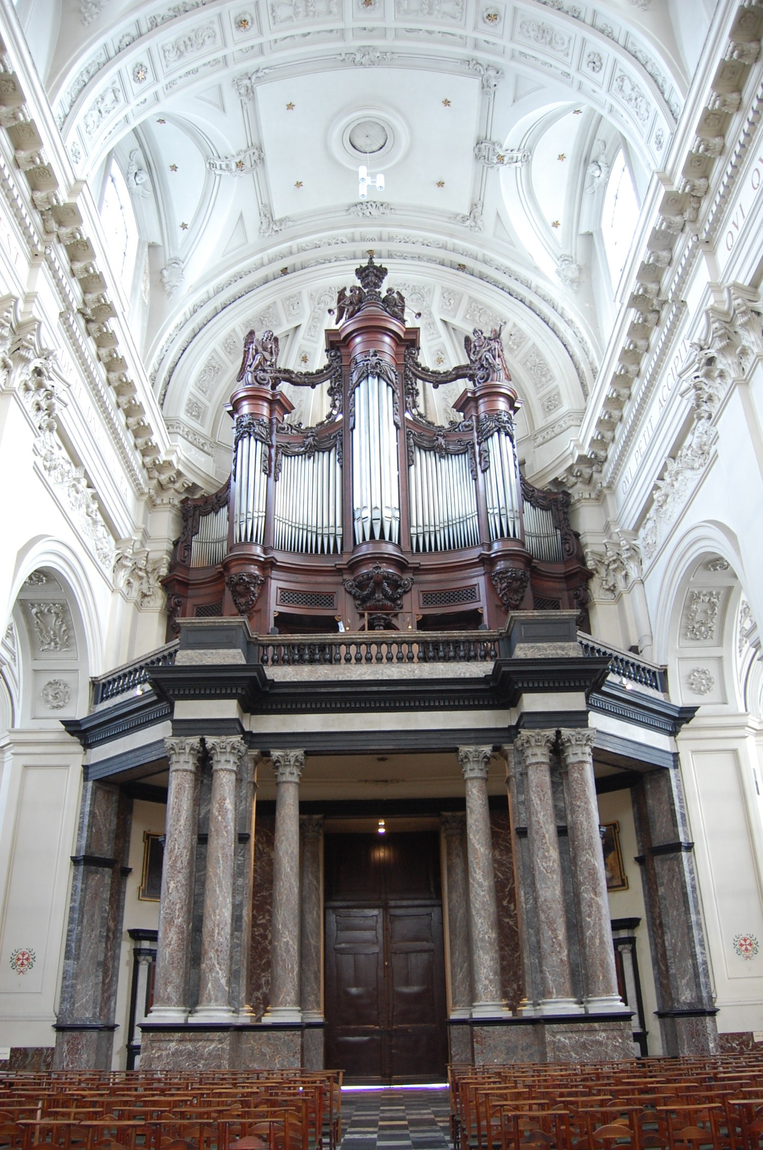 Cathédrale Saint-Aubain